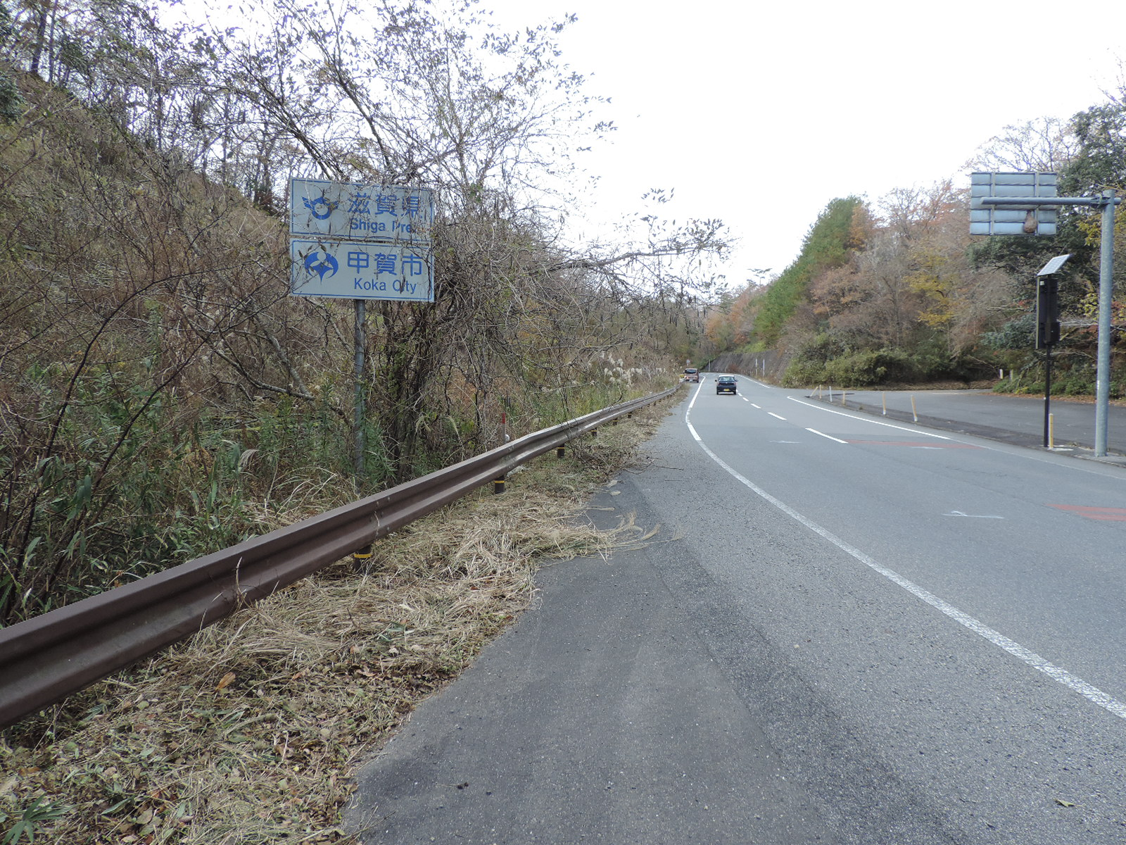 国道422号桜峠（上り線大津市方面を臨む）。2017年撮影